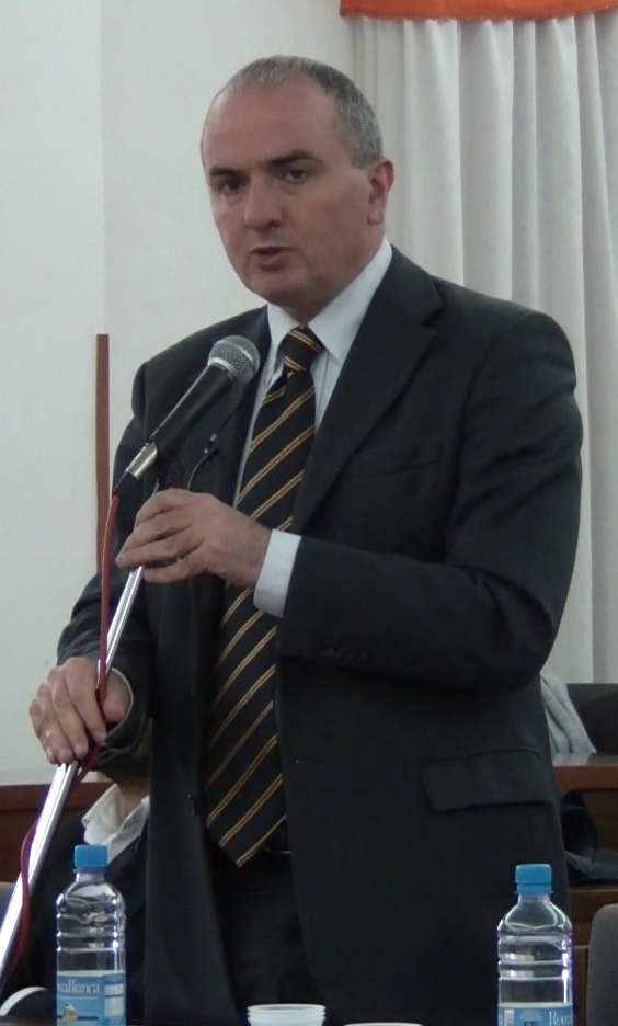 Giuseppe Lumia. Ribera Social Forum. Convegno "Racket e Antiracket". Aula Consiliare "L.Frenna" Ribera(Ag)